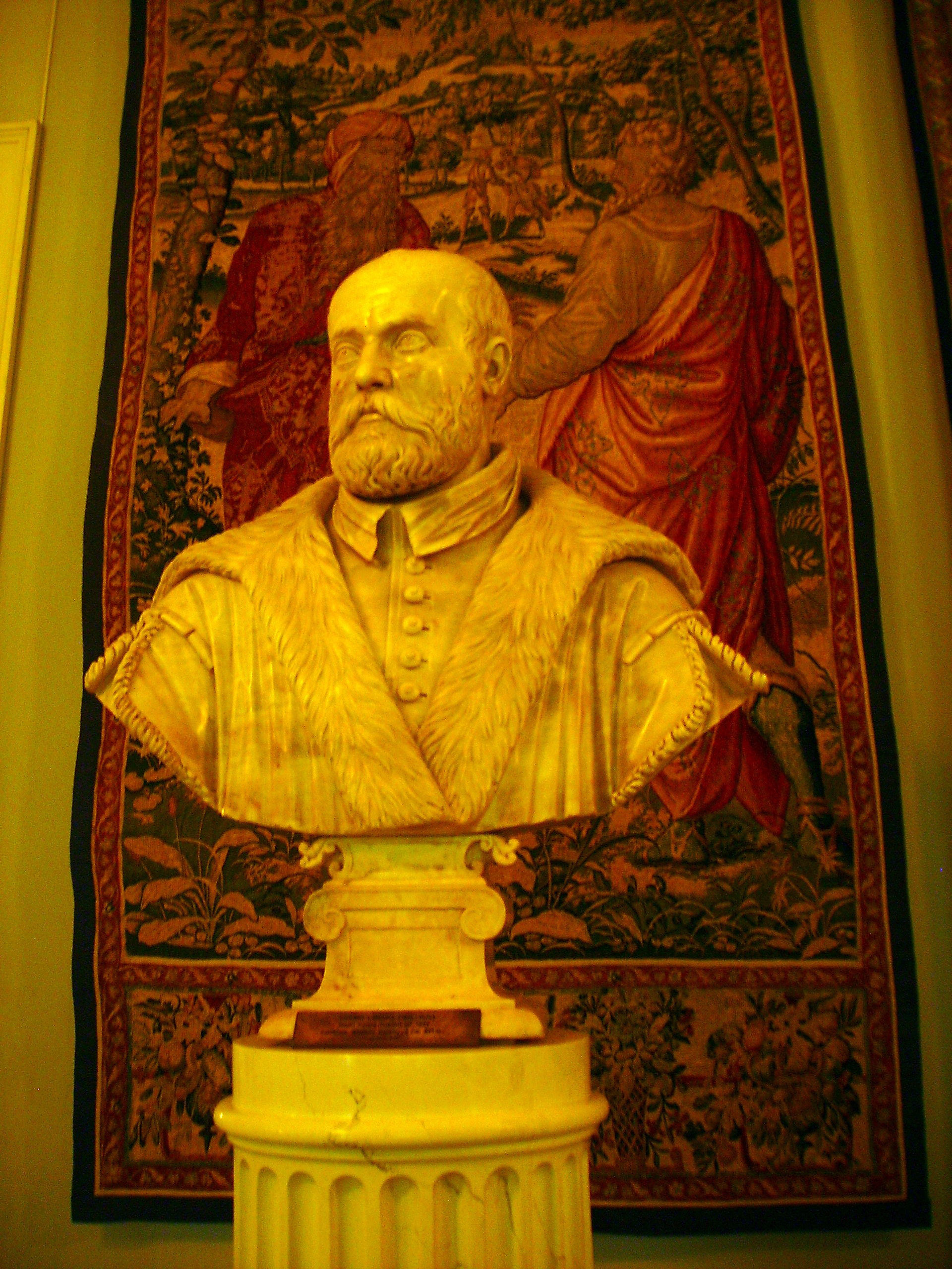 Bust of Cosimo I de' Medici by Giovanni Caccini (1537)